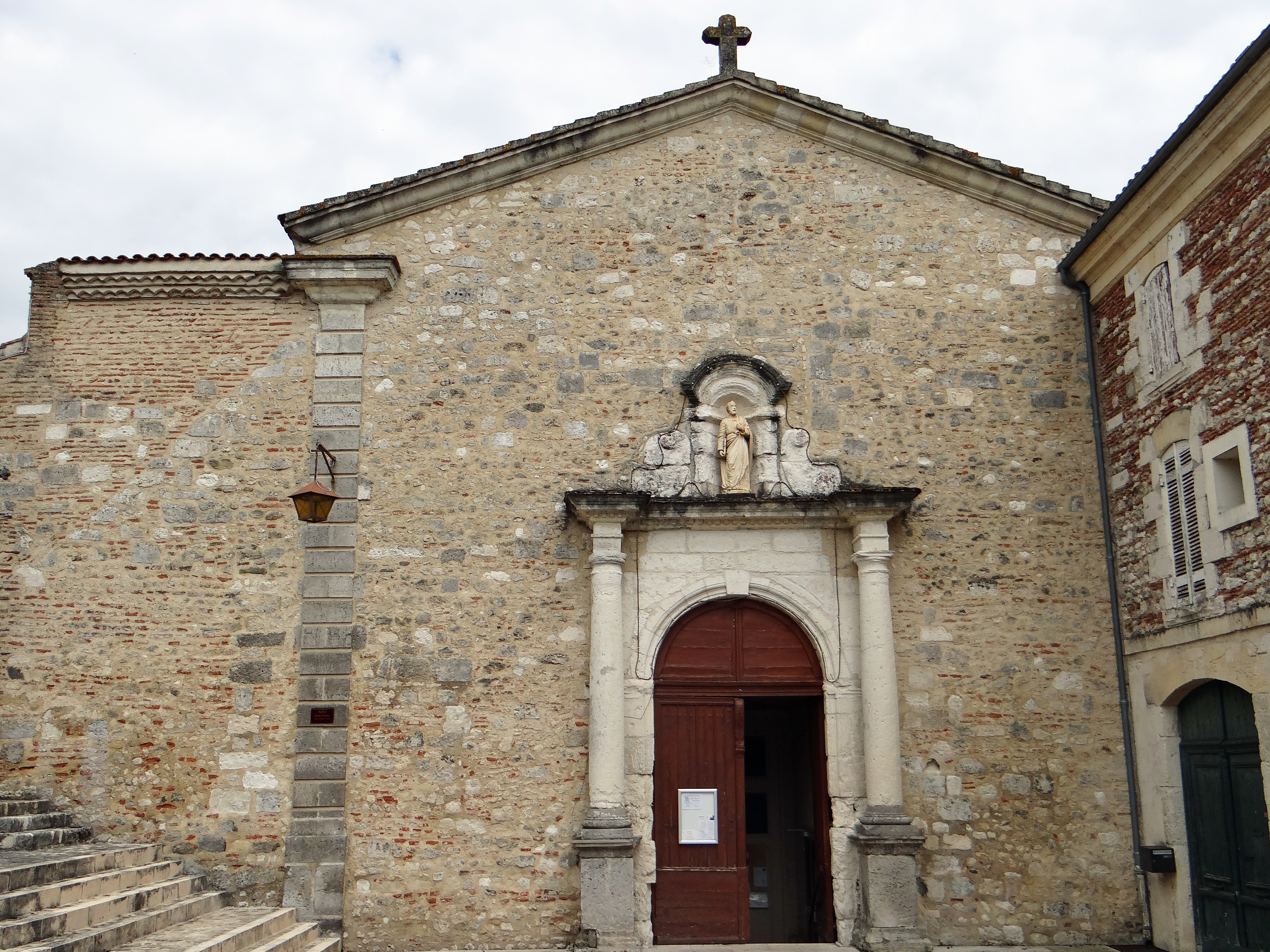 Clairac - Église Saint-Pierre-ès-Liens - Façade de l'église